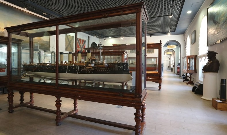 Экспозиция Центрального военно-морского музея